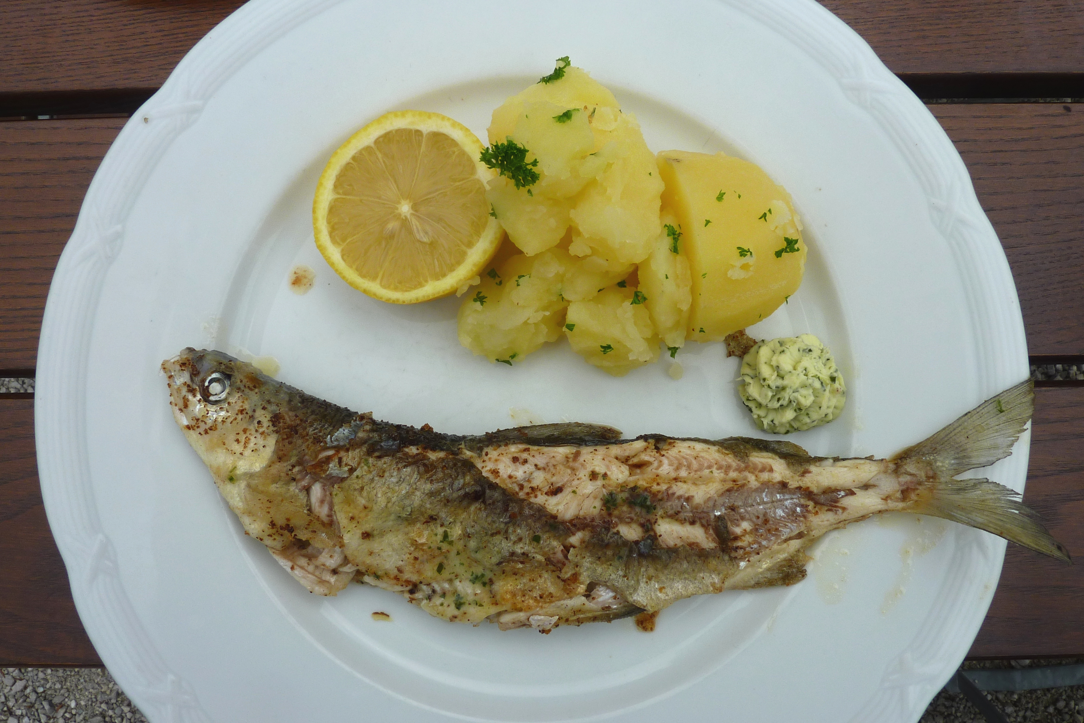 Gebratener Riedling (Coregonus danneri) in einem Lokal in Traunkichen am Traunsee, Österreich